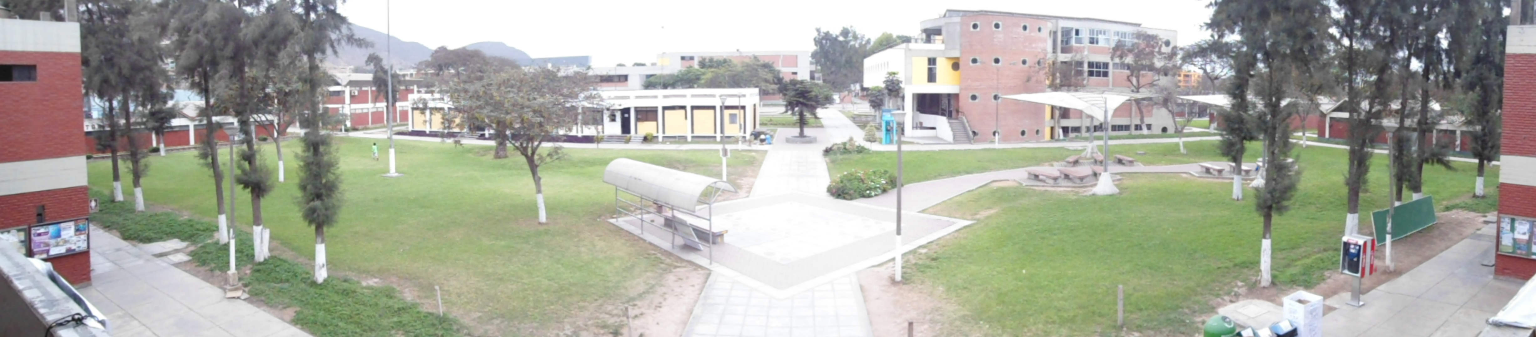 Vista panorámica del Patio Fiis desde el segundo piso del Pabellón S4.